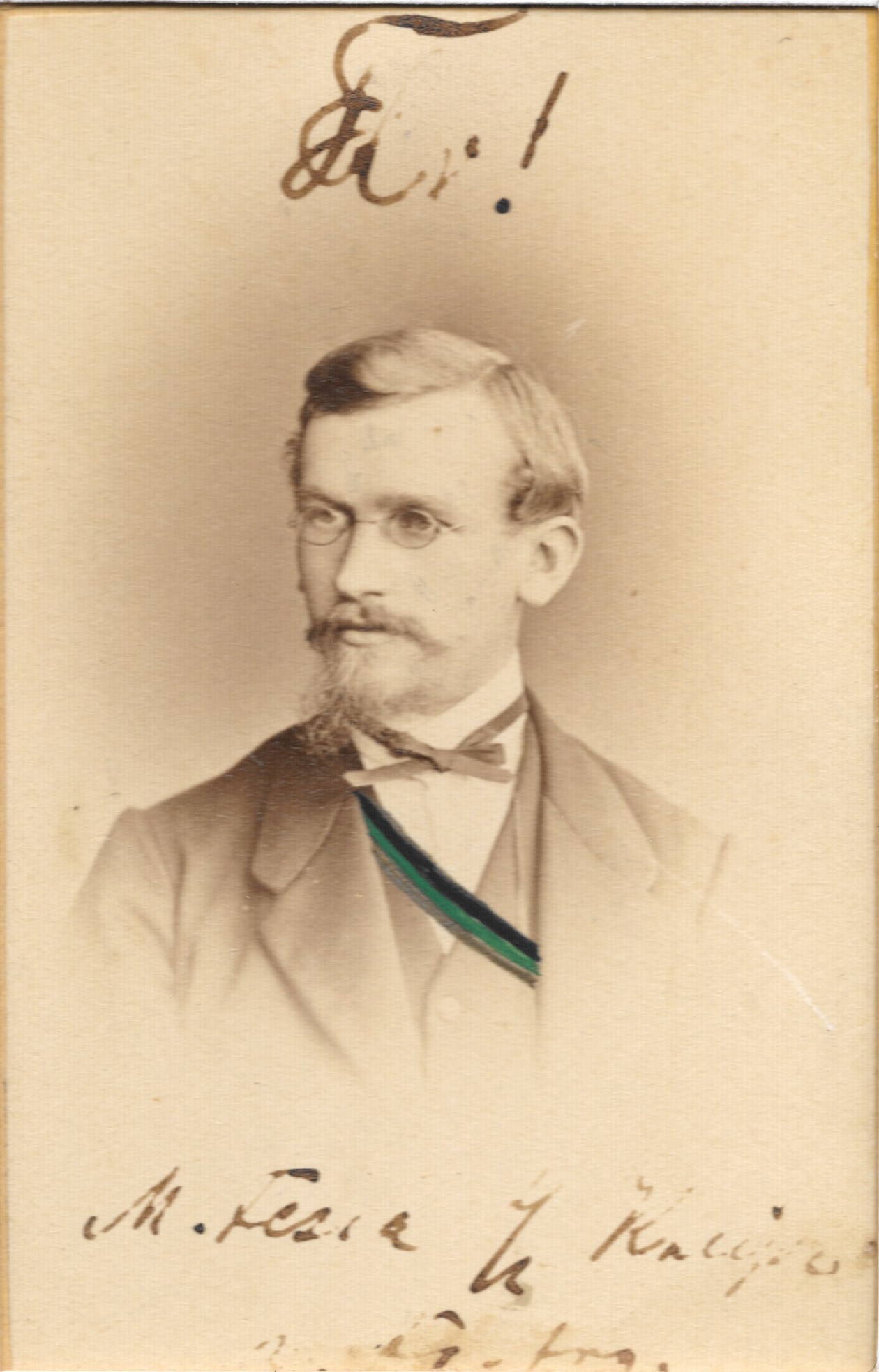 Max Fesca Porträt des Corps Teutonia-Hercynia